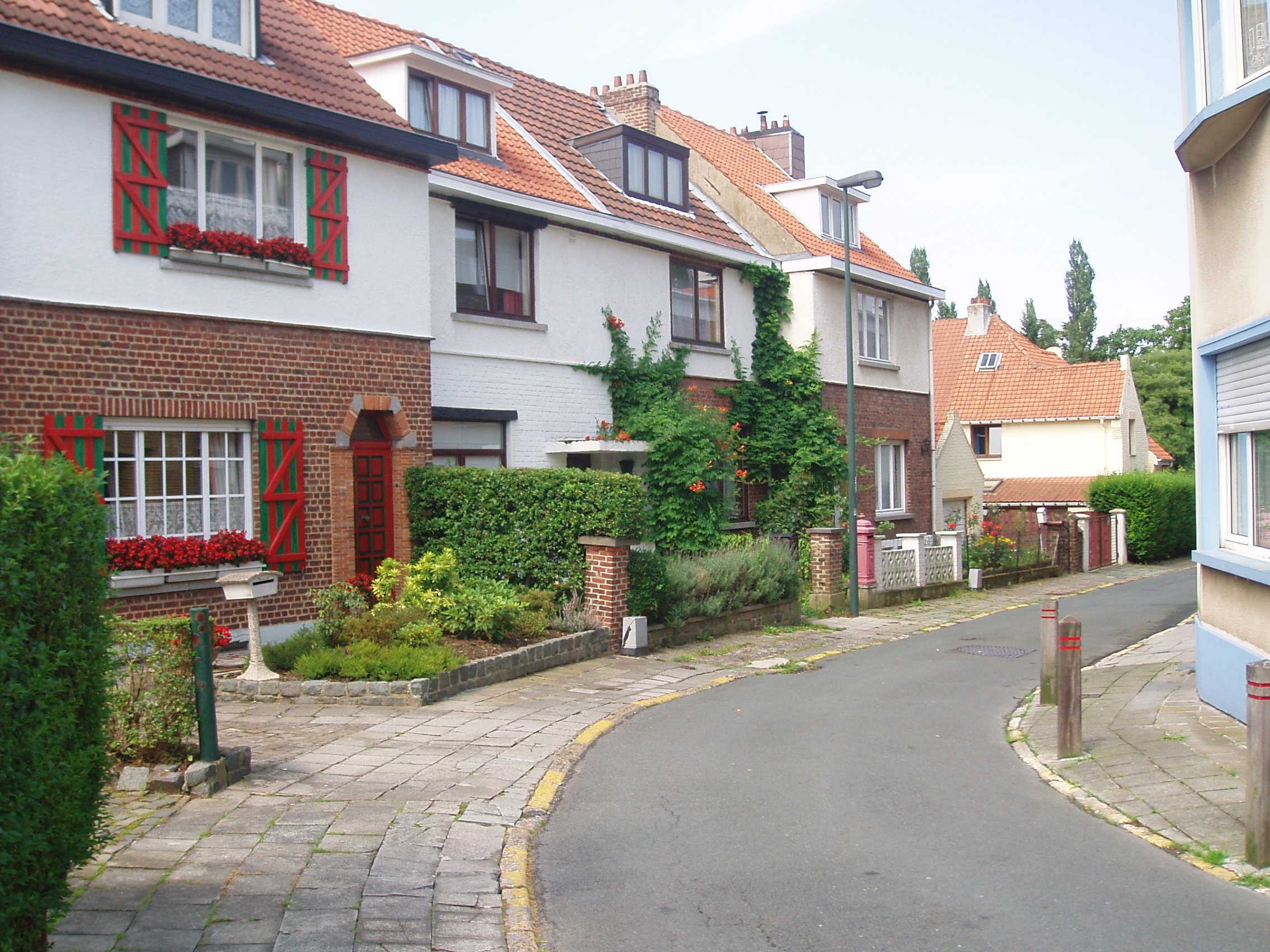 rue Henri Vereycken Auderghem Belgium